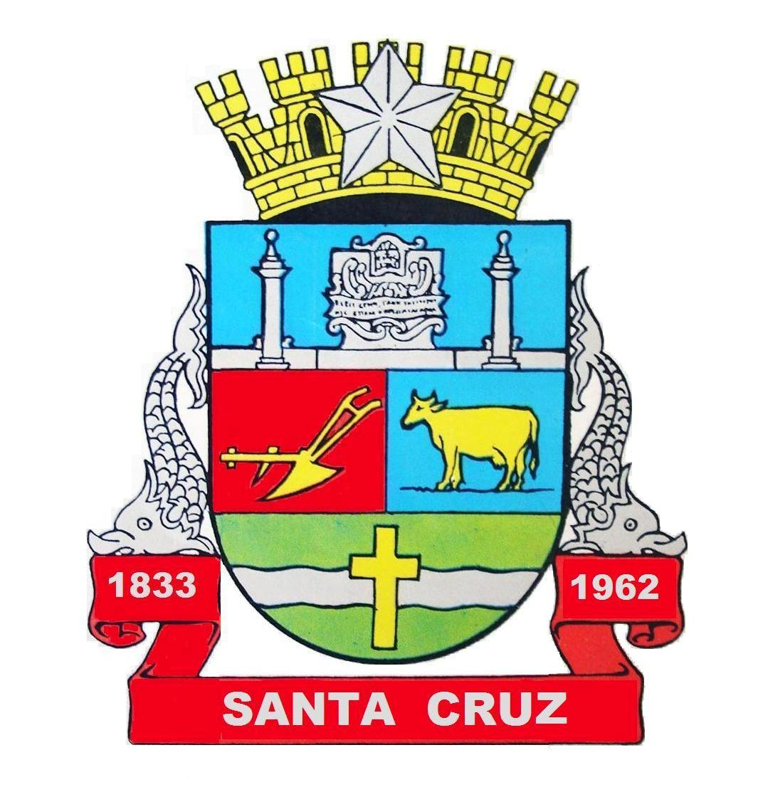 Arte feita no paint do brasão de Santa Cruz - Rio de Janeiro